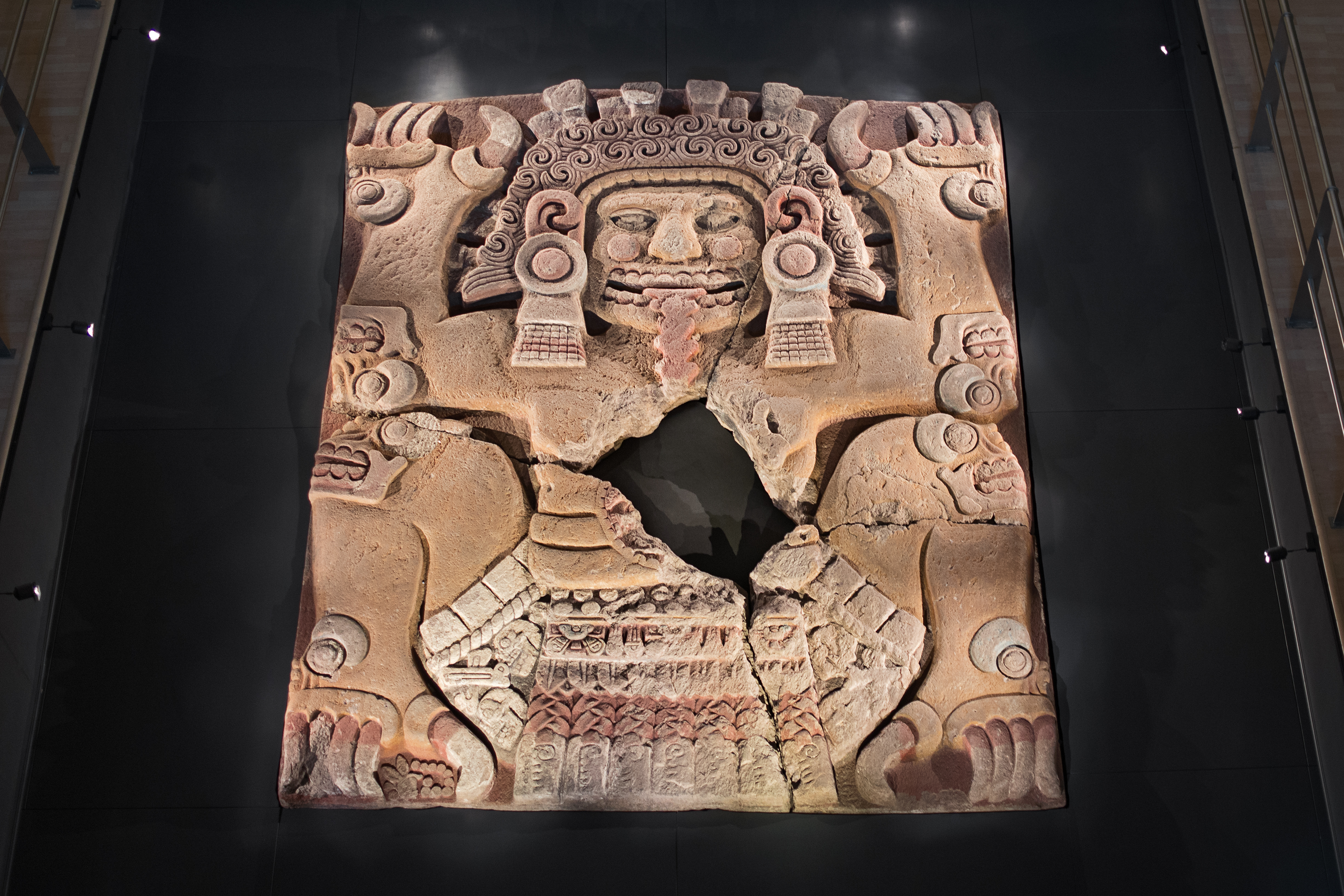 Monolithe de Tlaltecuhtli (Musée du Templo Mayor, Mexico).